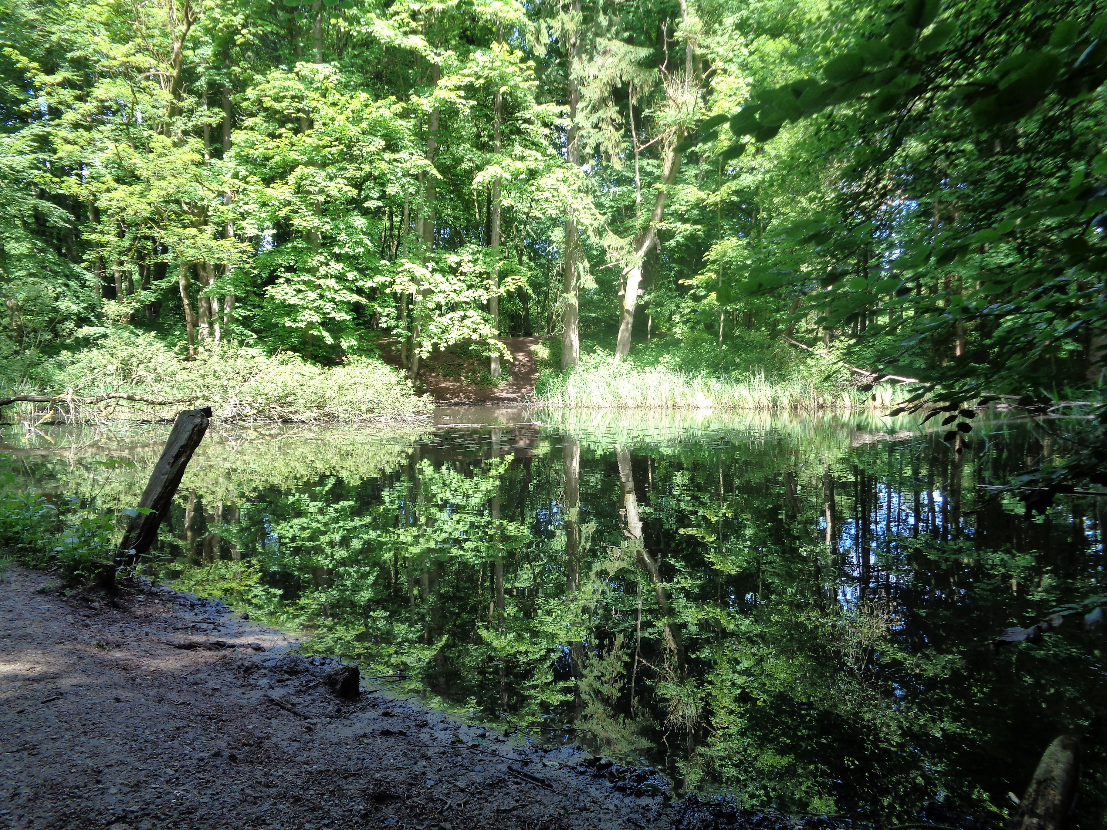 Spiegelungen in einem Teich im Vieburger Gehölz.